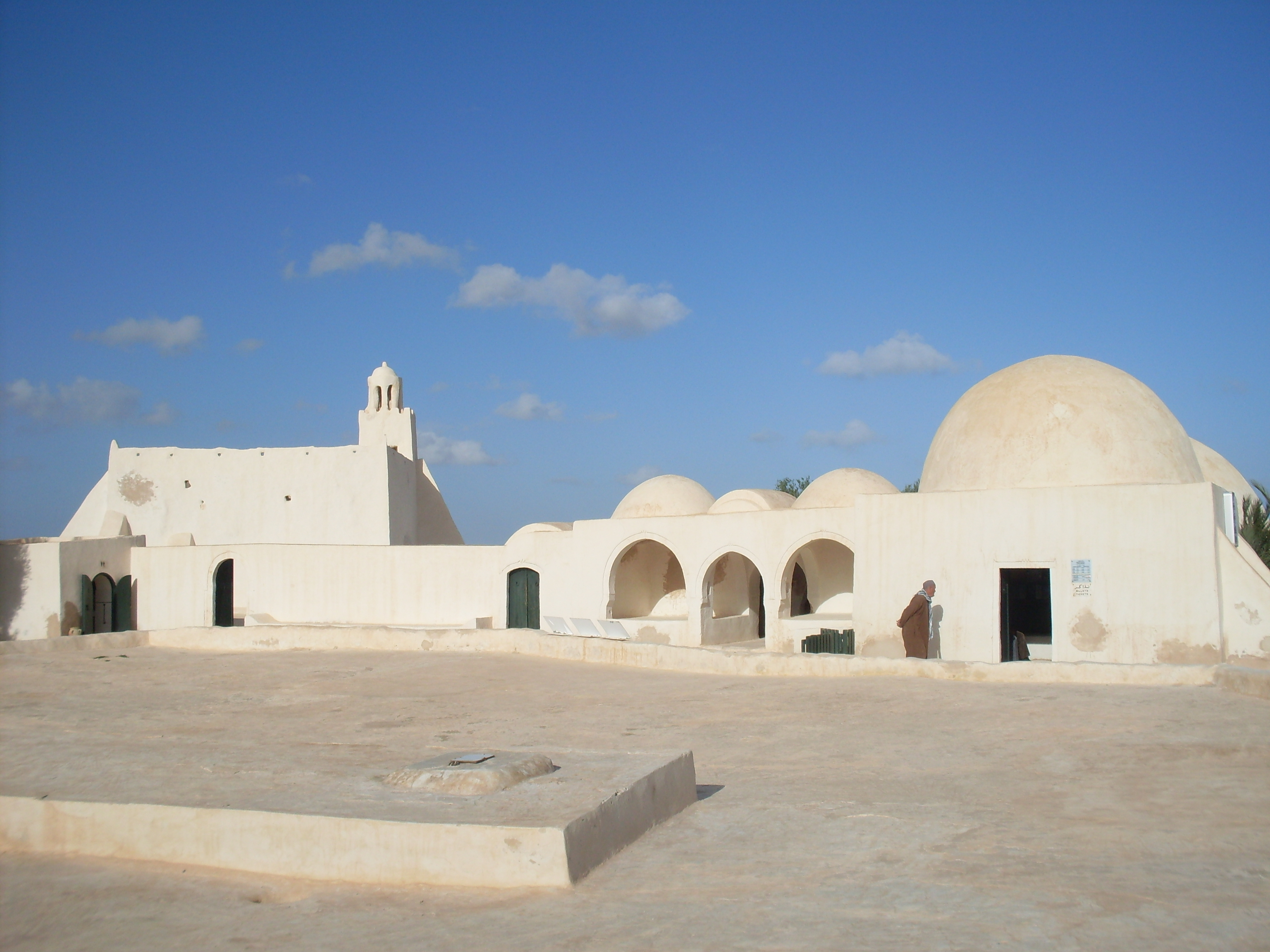 Tunisie, Djerba, Jemaa Fadhloun